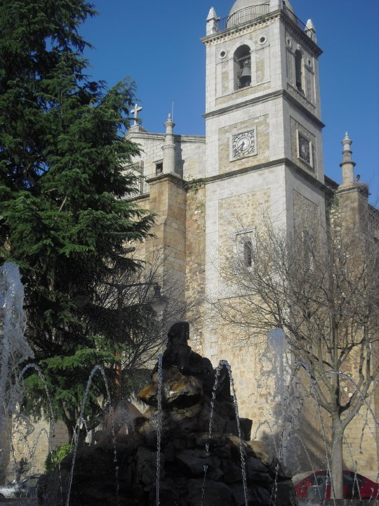 Plaza de España en Don Benito, detalle de la fuente y la Parroquia de Santiago al fondo.